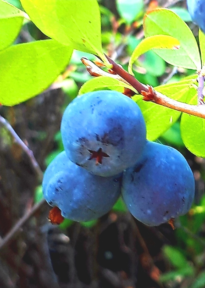 Blueberries in Eastern Siberia